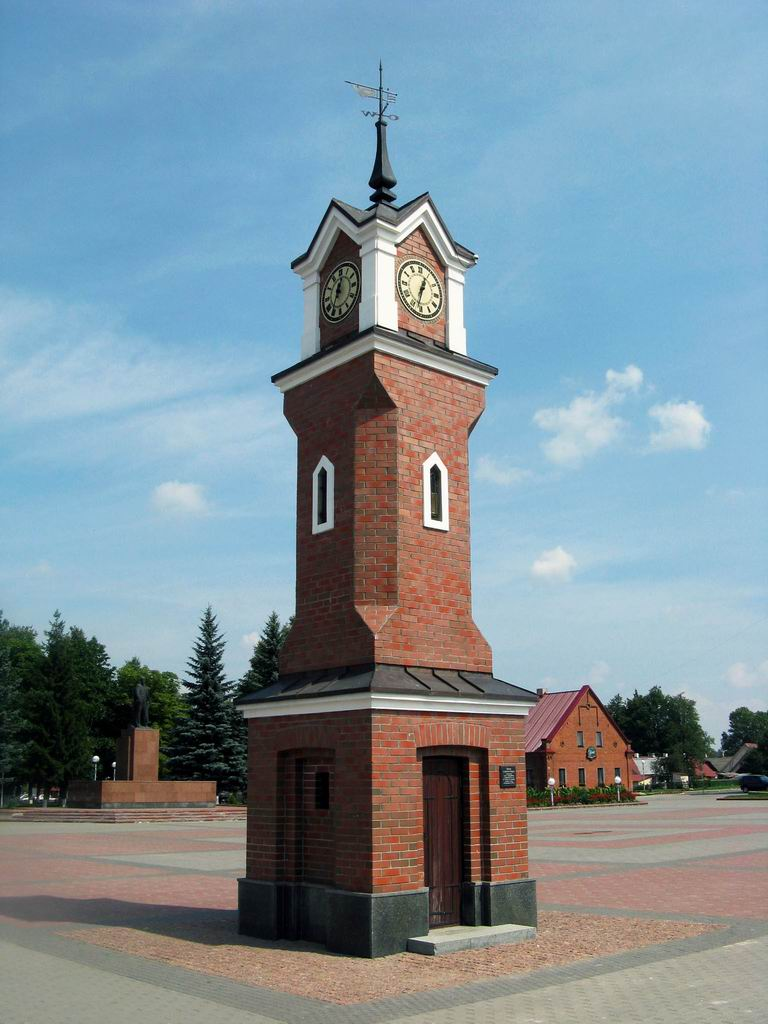 Беларуская (тарашкевіца): Шчучын